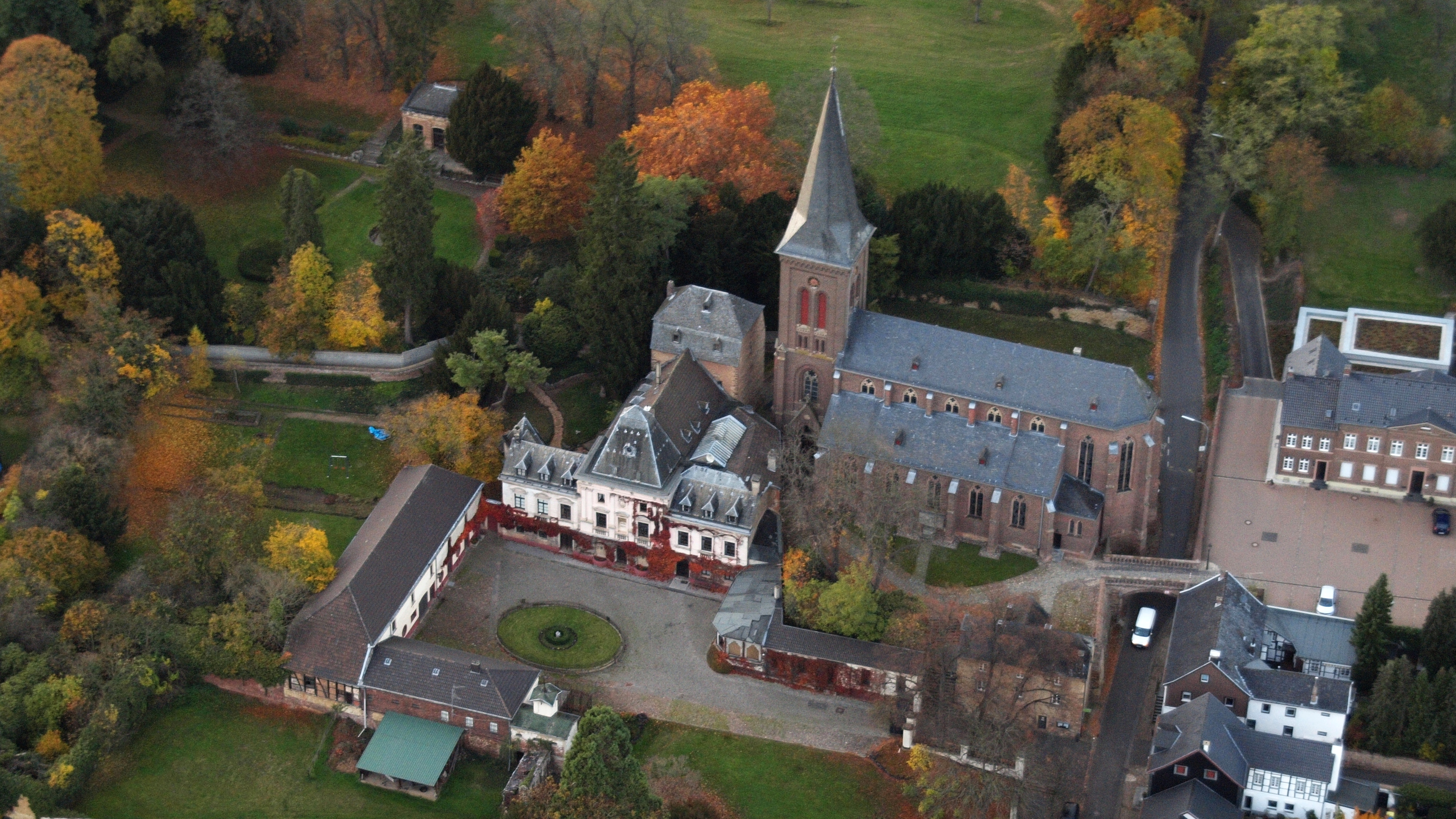 Burg Kommern, Luftaufnahme (2015)